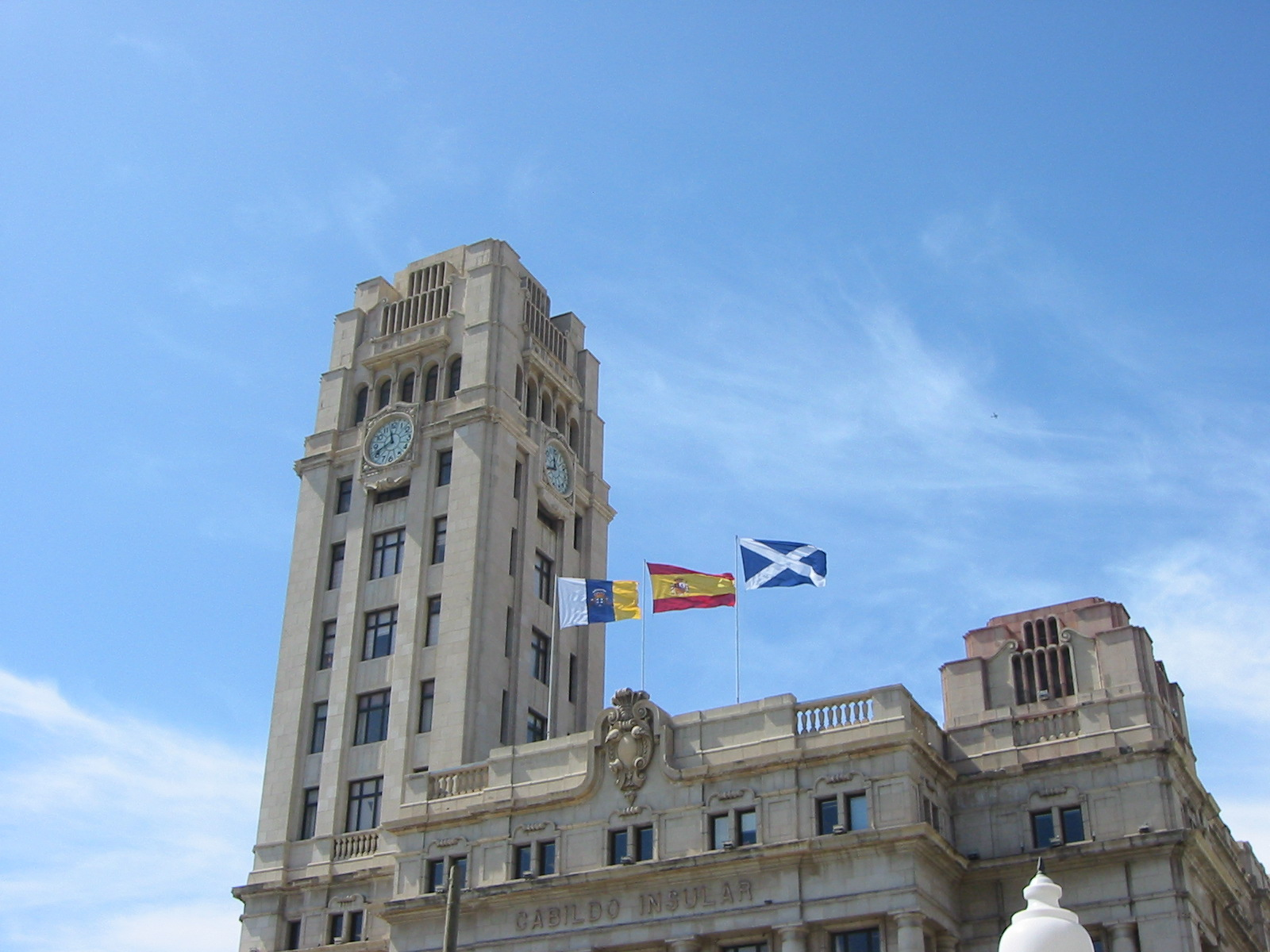 Cabildo de Tenerife, Tenerife, Islas Canarias (España)